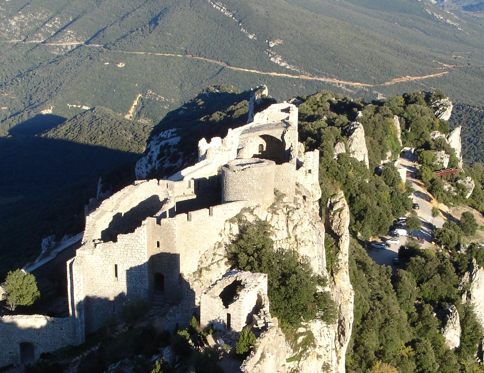 Château de Peyrepertuse